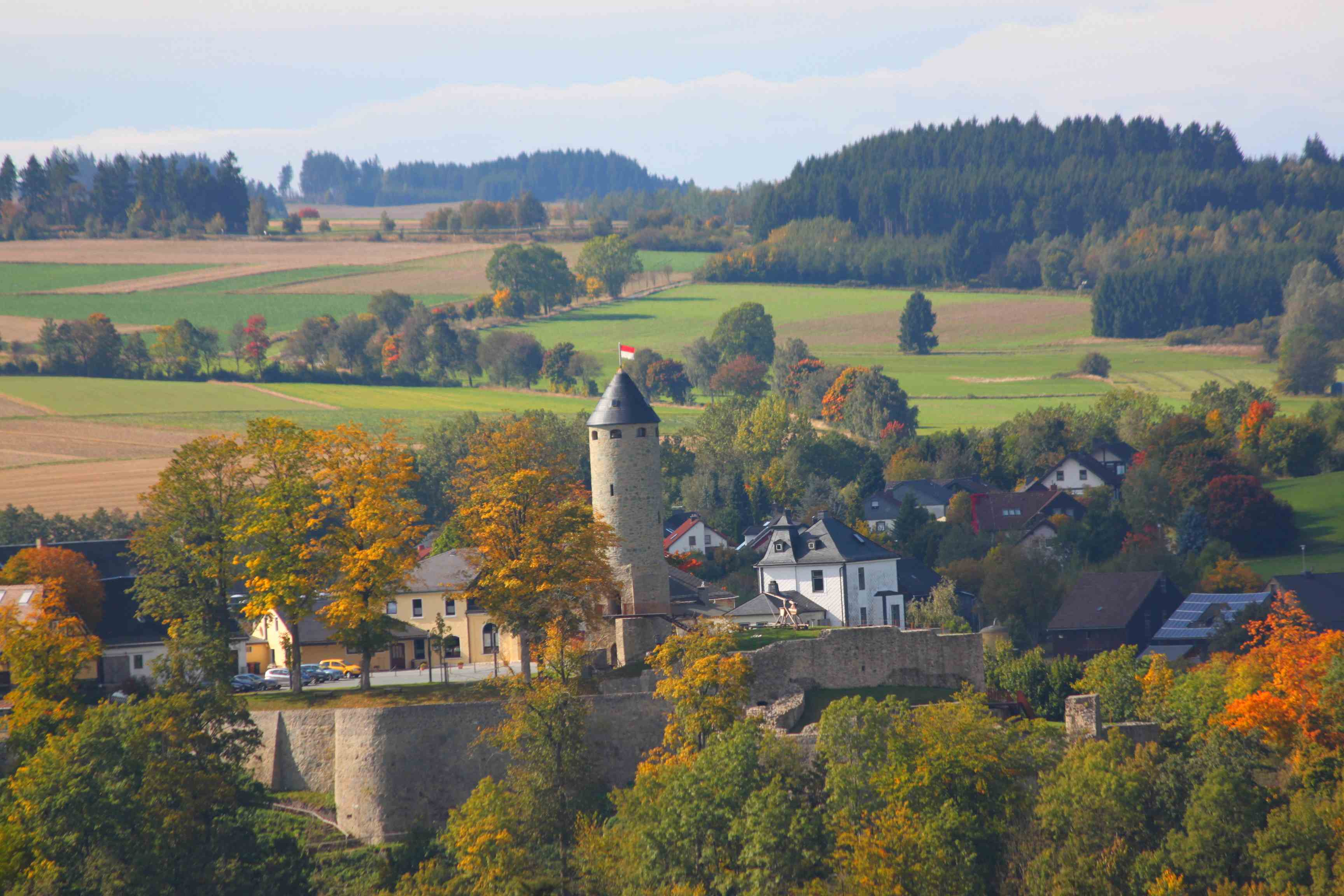 Blick auf die Burgruine von Lichtenberg vom Hirschsprung im Höllental aus